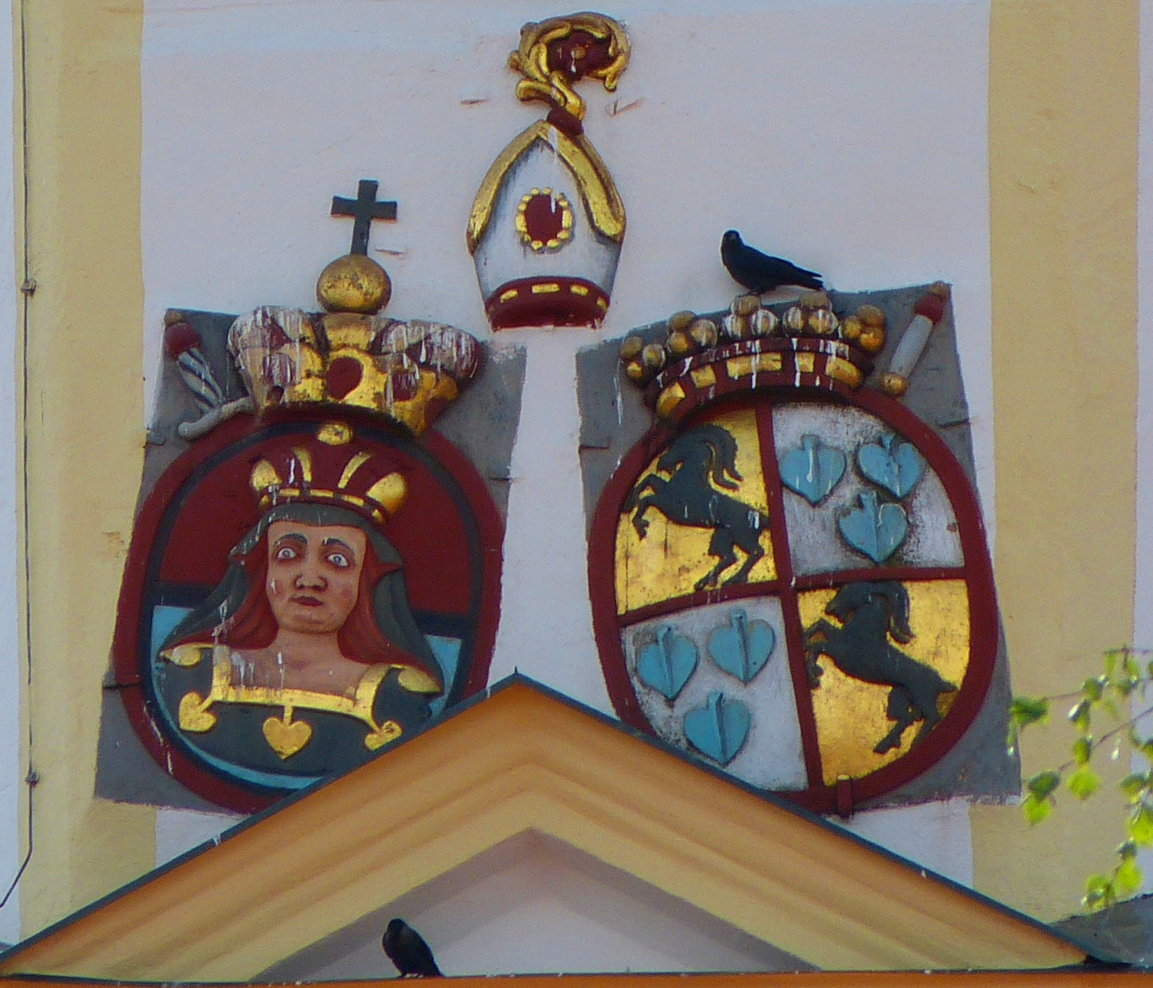 Wappen des Fürststift Kemptens und Rupert von Bodmann am Turm der Kirche St. Philipp und Jakob in Bad Grönenbach, Bayern